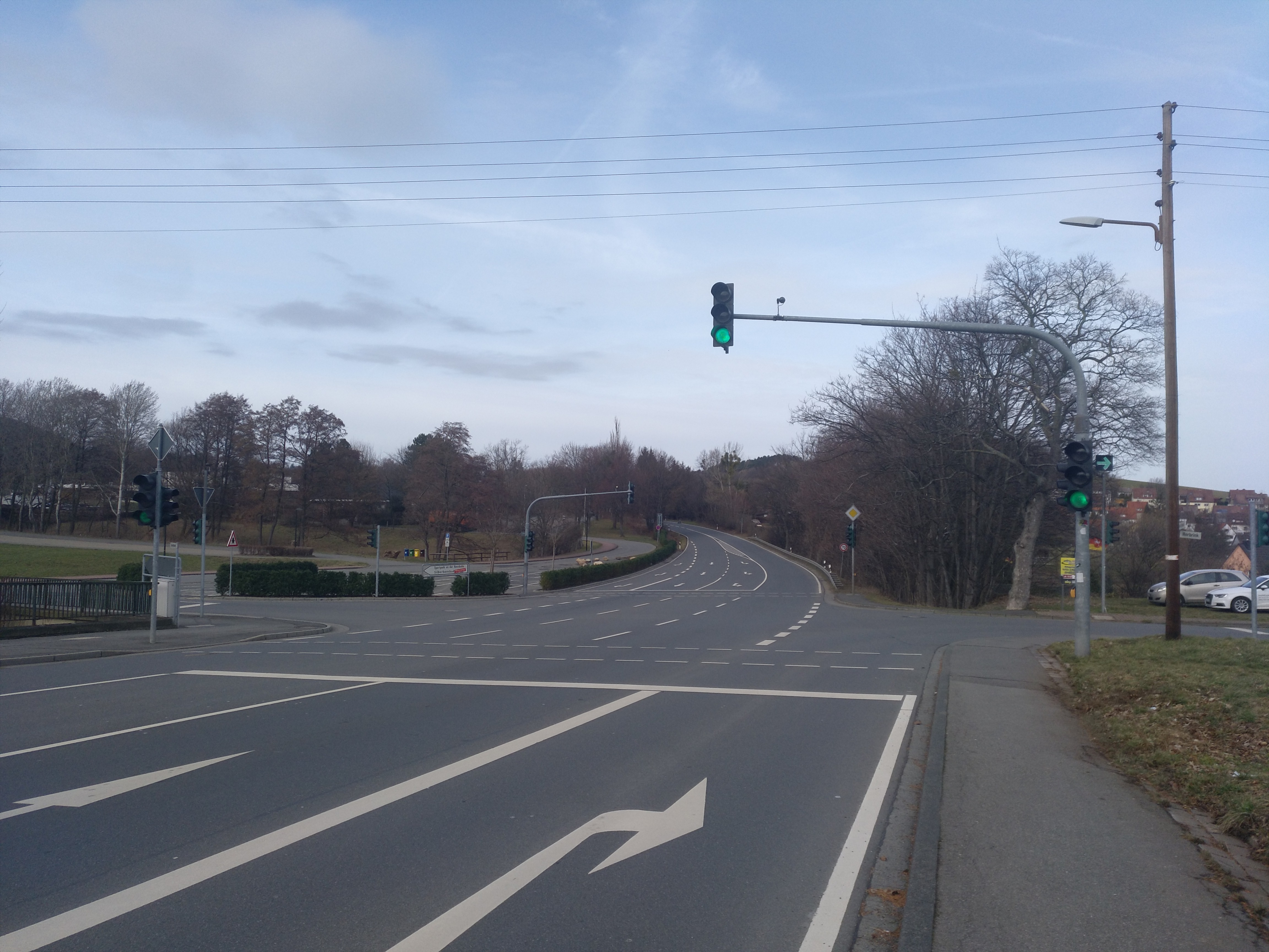 Die Landesstraße L 501 bei Schlewecke, Bad Harzburg, Februar 2019.